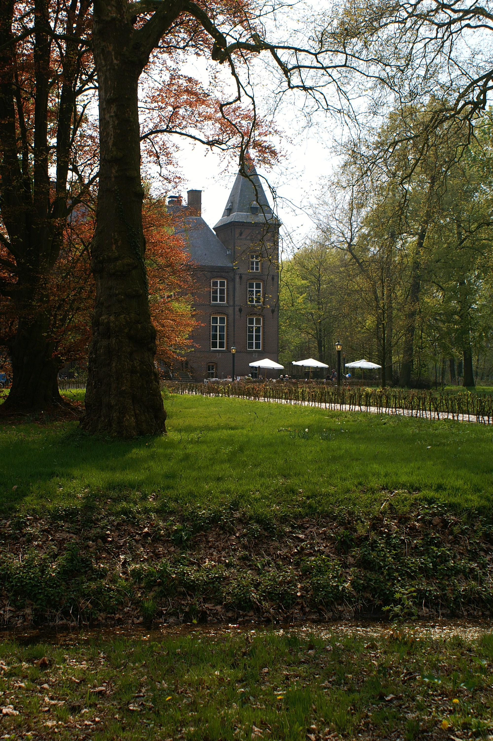 De parkaanleg van kasteel Nemerlaer te Haaren.